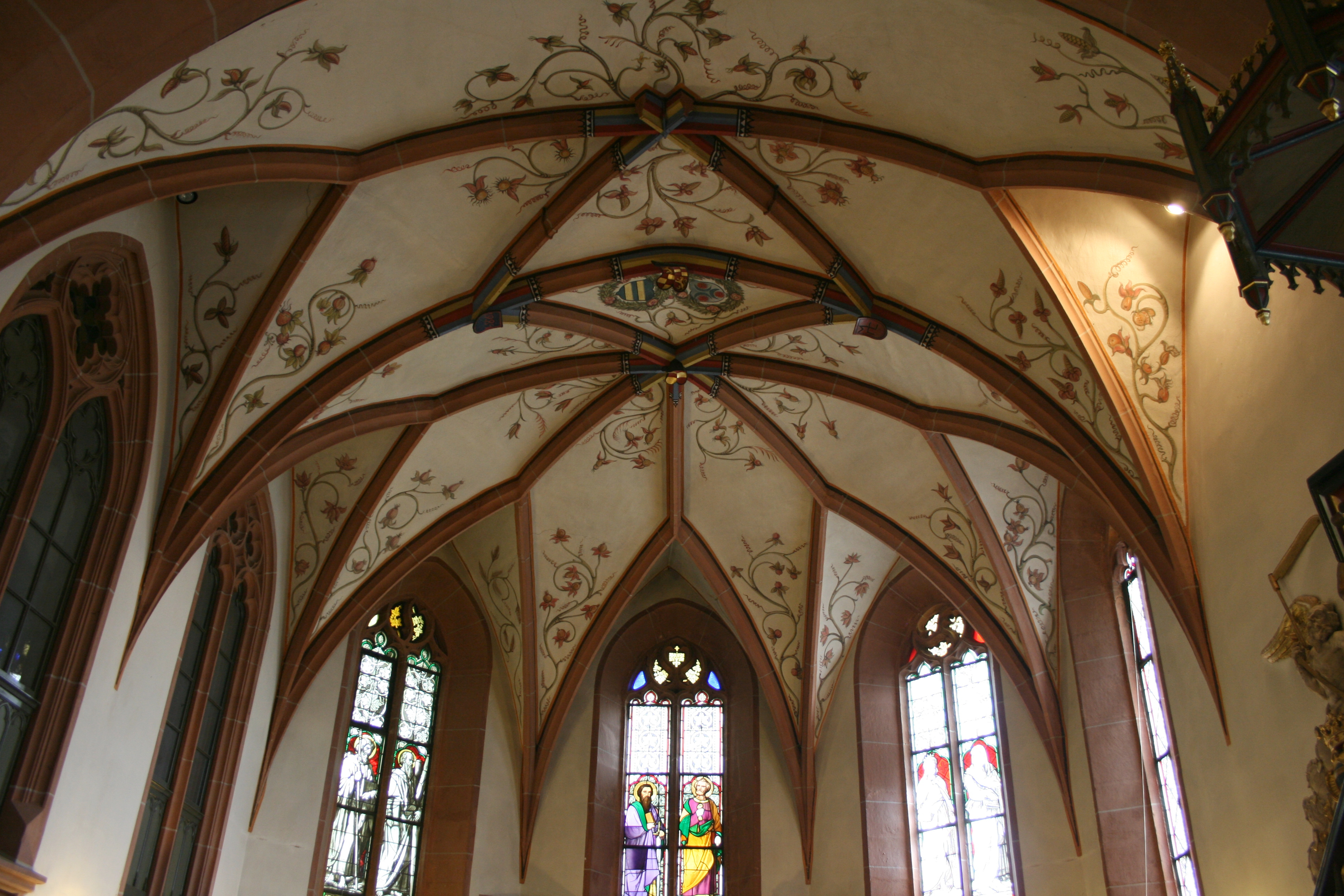 Sterngewölbe im Chor der Ev. Kirche von Fränkisch-Crumbach, Odenwaldkreis, Hessen.